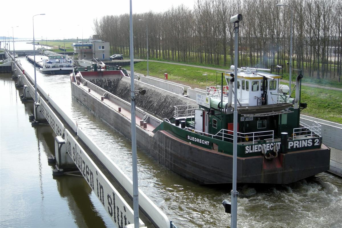 Prinses Margrietsluis, schutsluis bij Lemmer